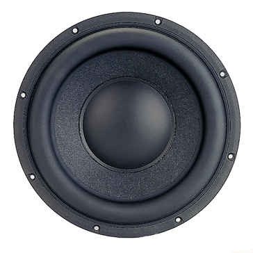 10" loudspeaker